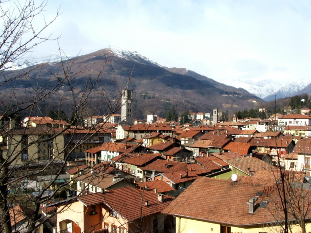 Panorama di Andorno Micca